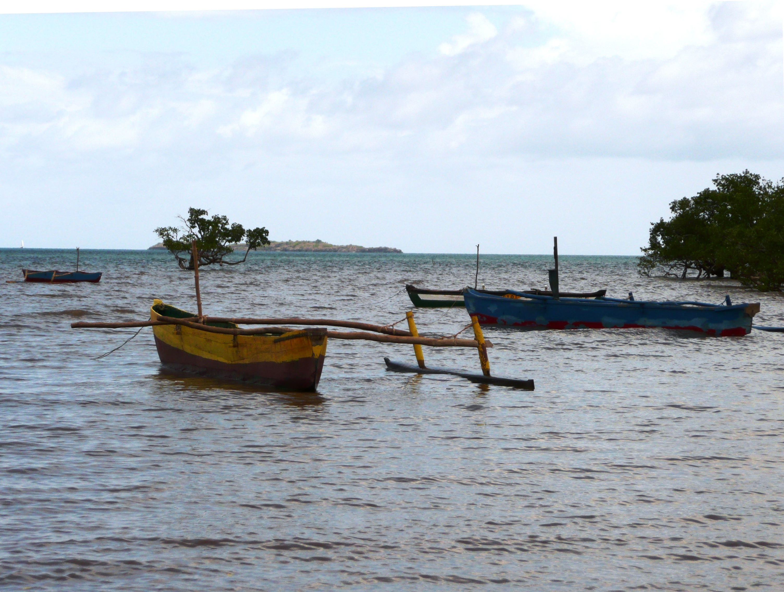 N2, Passamainty, Mayotte